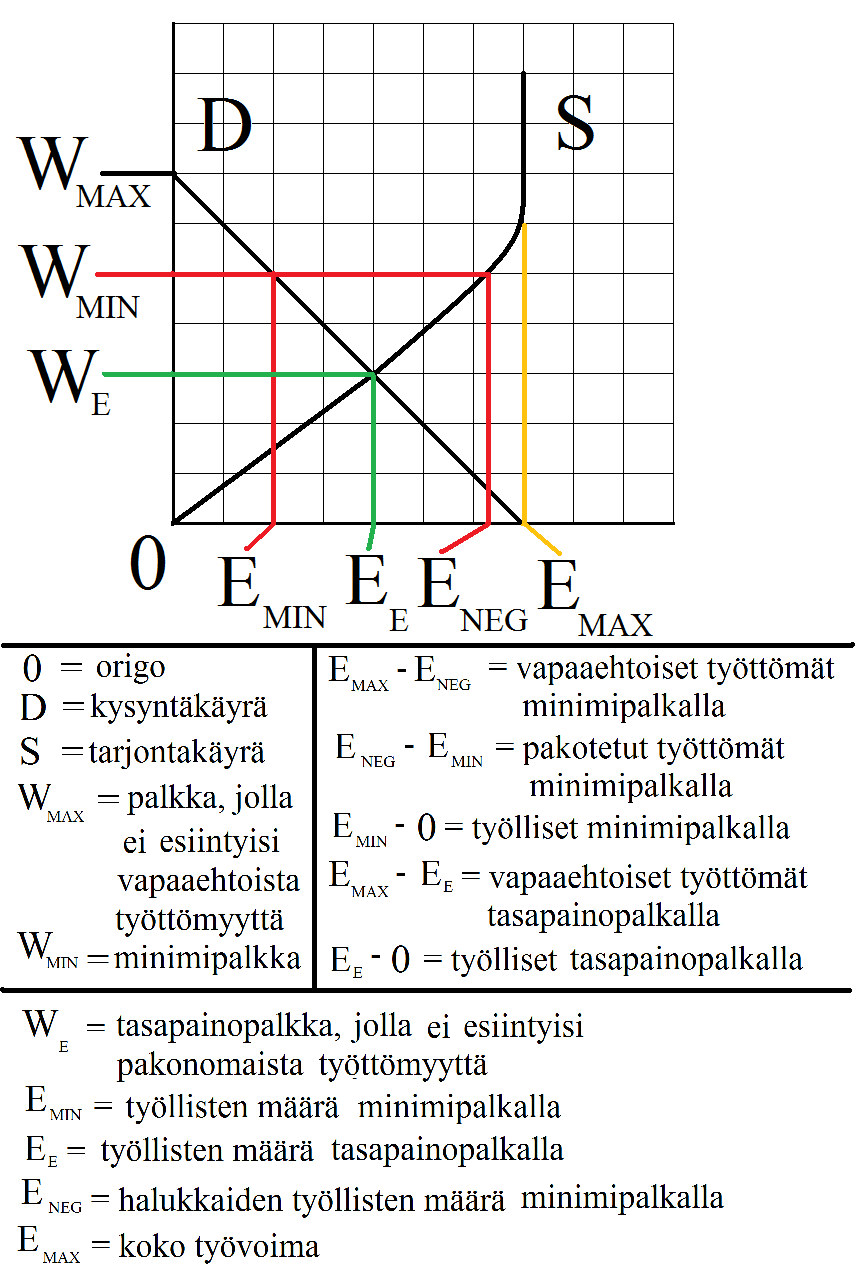 minimipalkka työmarkkinoilla